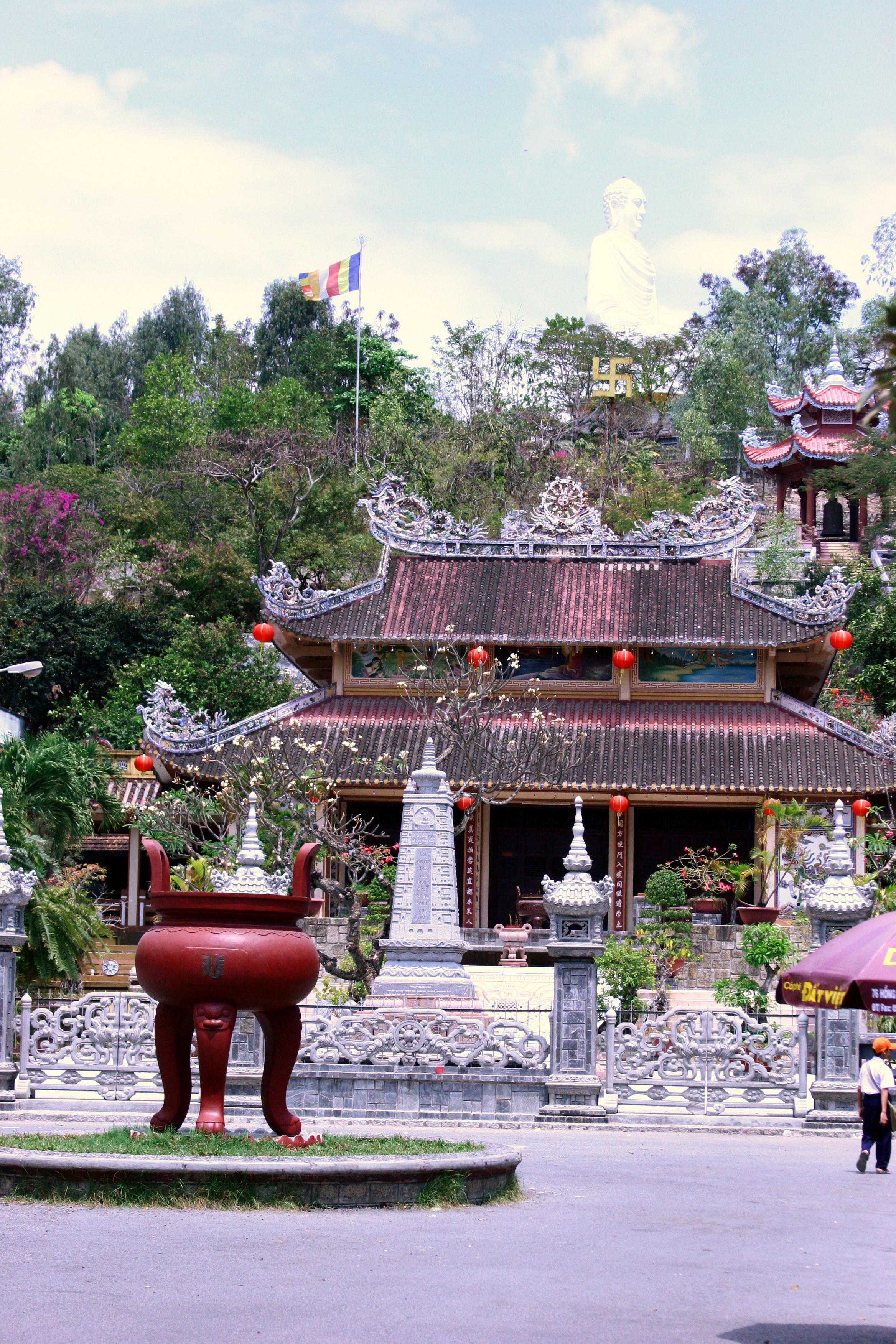 Long Son pagoda in Nha Trang.